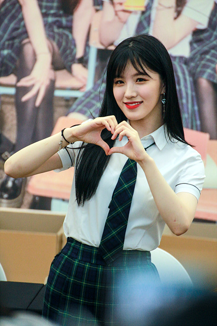 170910 프리스틴 팬싸인회